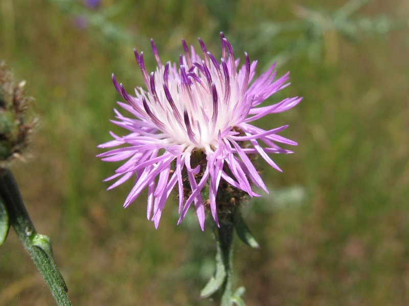 Rispen-Flockenblume Centaurea stoebe, Müritz-Gebiet